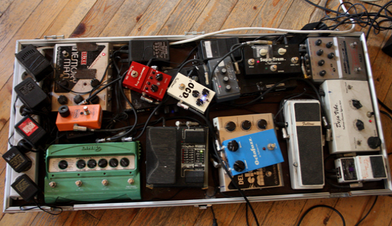 Akın Eldes Pedallar